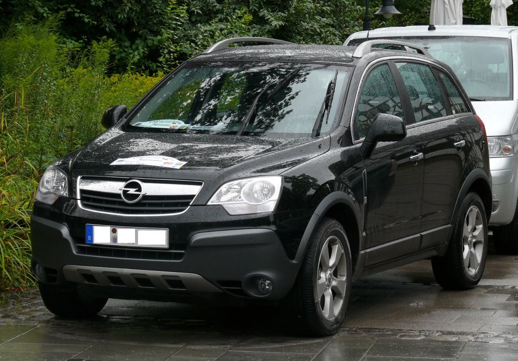 Opel Antara